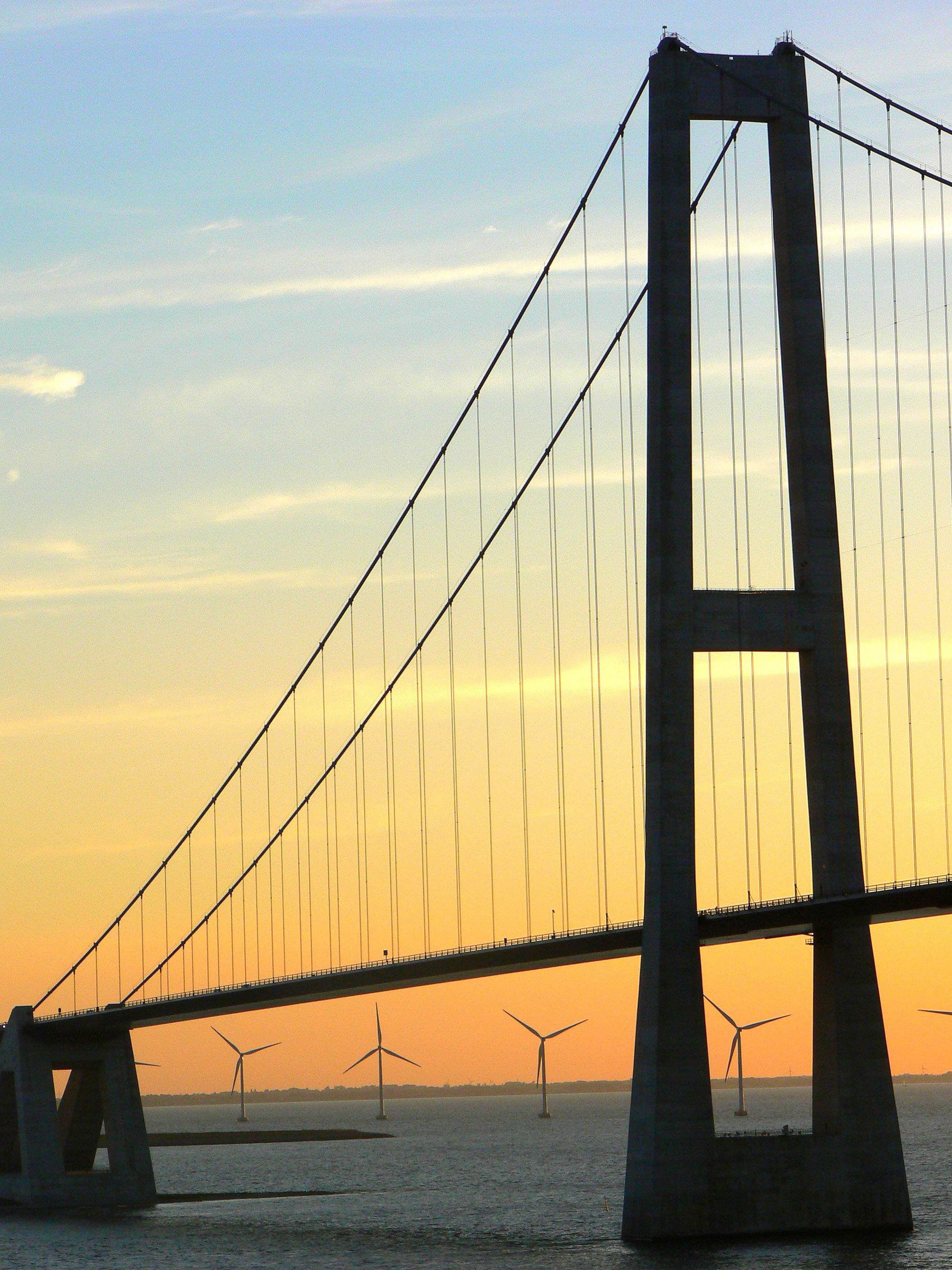 Die Great Belt Bridge aufgenommen am 23. August 2010.